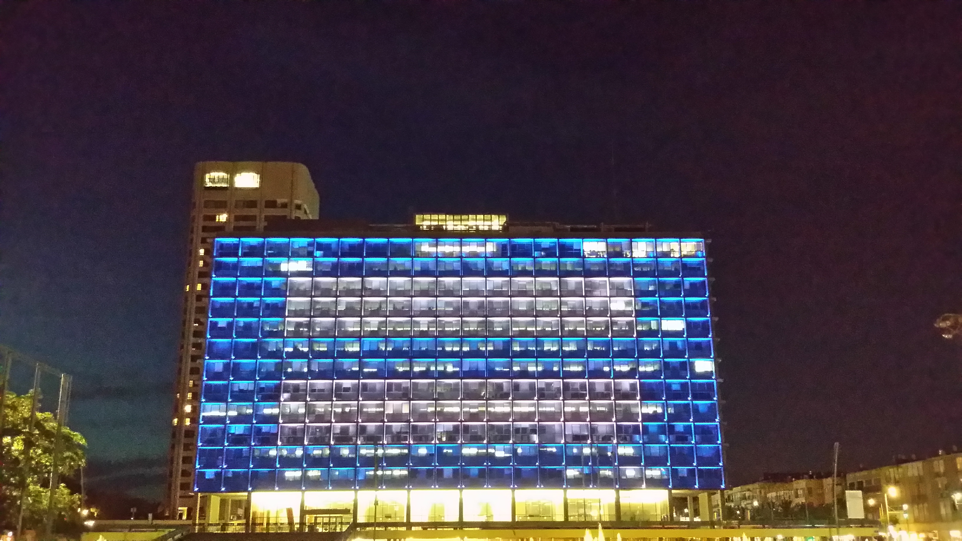 Мэрия Тель-Авива перед прайд-неделей (02.06.14)